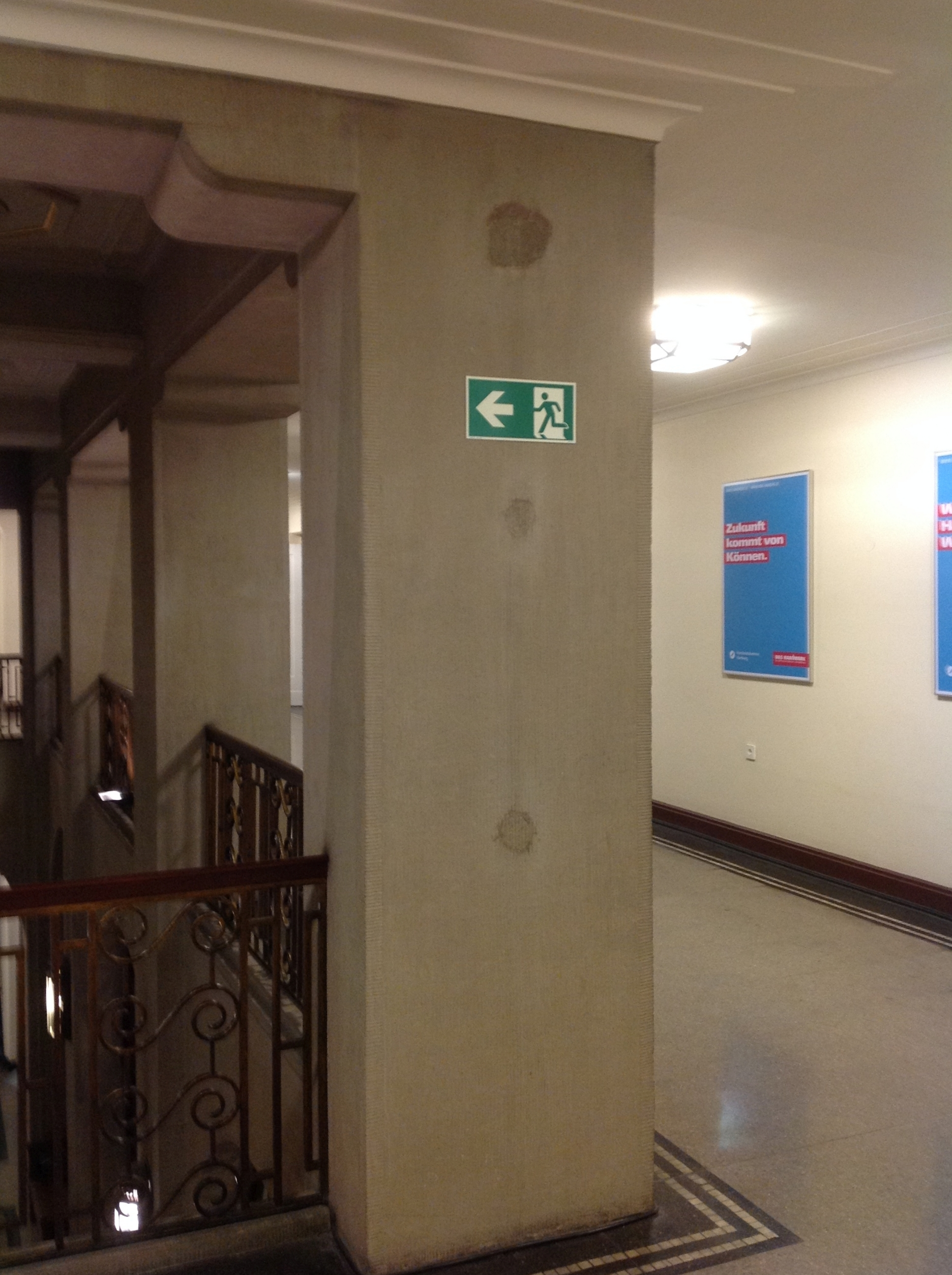 1917 - Spuren von der Befestigung des schmiedeisernen Gitters zum Schutz des hoheitlichen Bereichs der Gewerbekammer